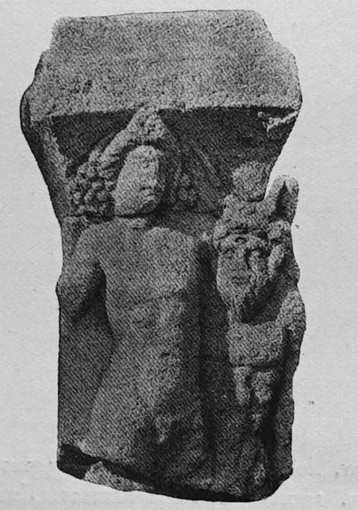 partie du tome 5.